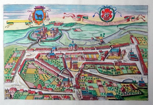 Łowicz in XVII century, LOVICENSIS CIVITAS QUAE EST ARCHIEPISCOPA